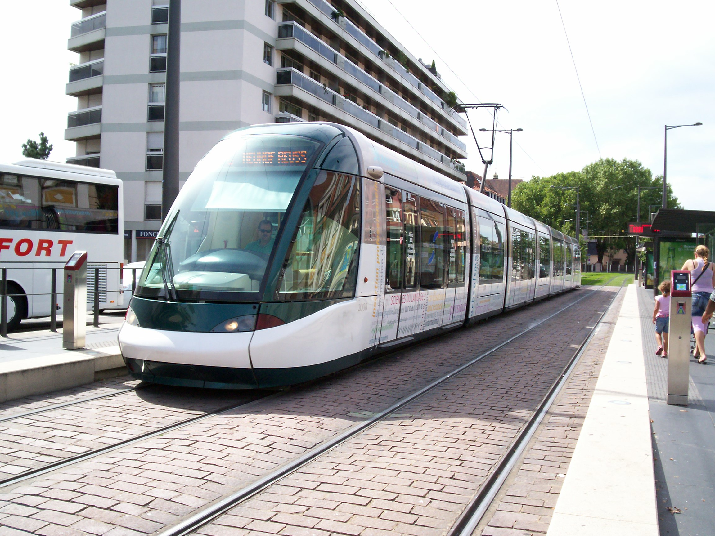 Tramway de Strasbourg Line C